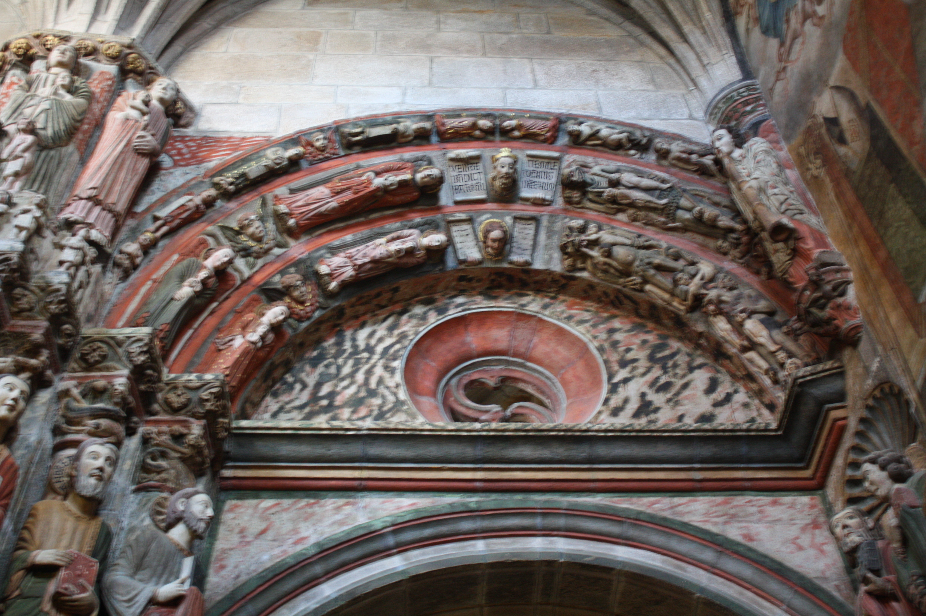 Arco do Xuízo Final, no Pórtico do Paraíso da Catedral de Ourense.